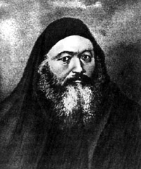 Иереми́я II Транос (1530—1595) — Константинопольский патриарх с 1572